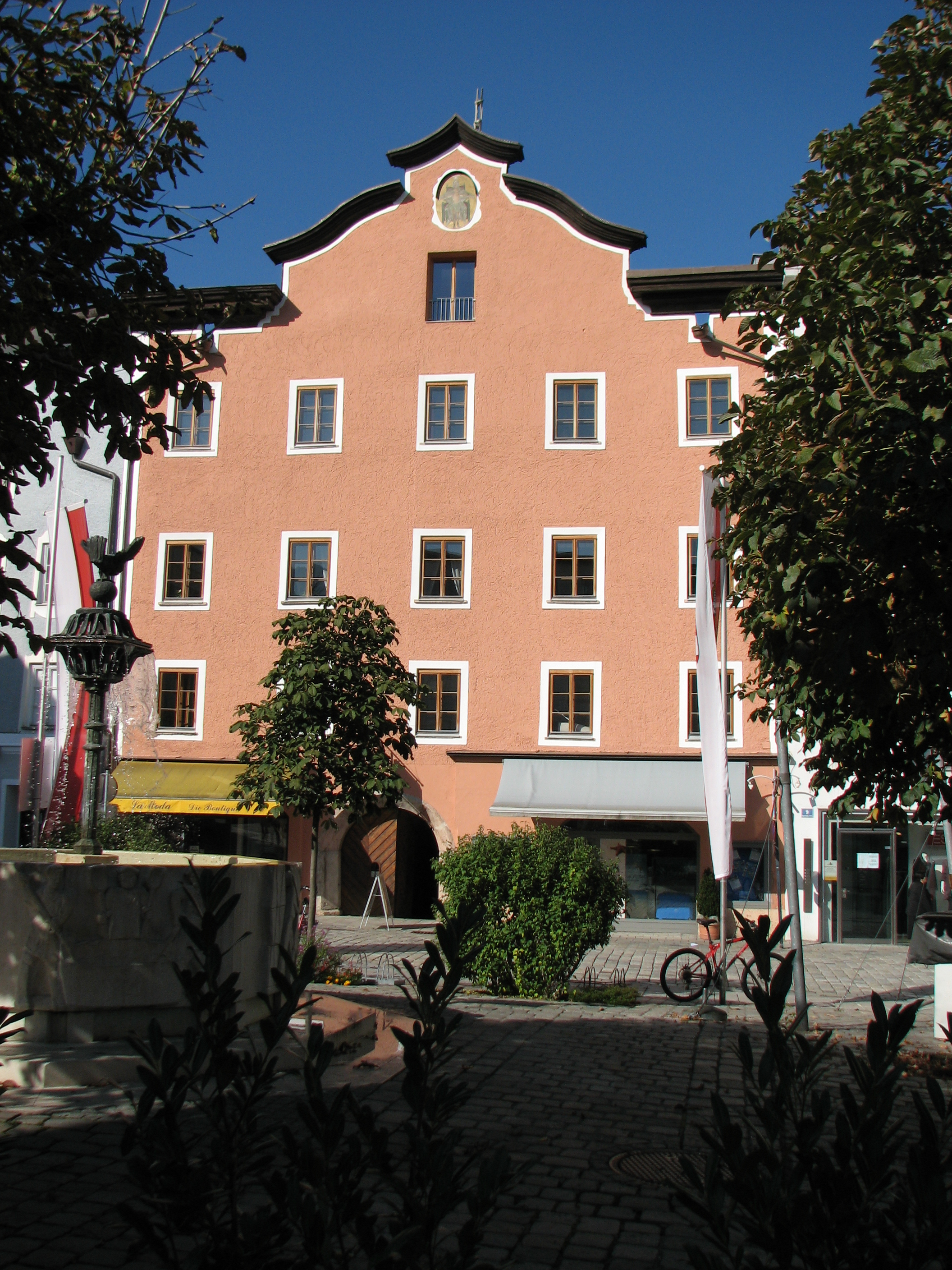 Bürgerhaus